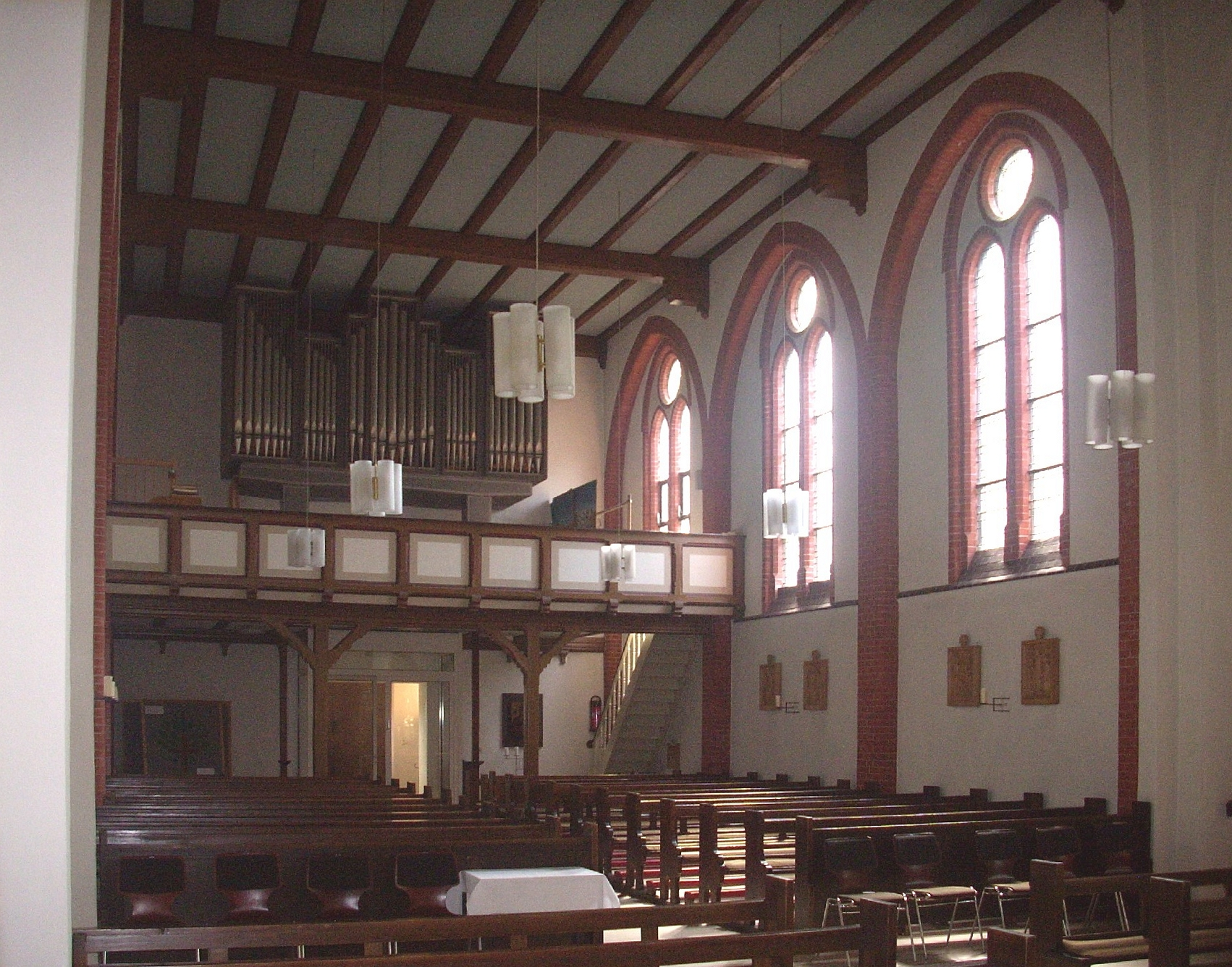 Lehrte, Kath. Kirche St. Bernward nach Osten (älterer Teil); Orgel